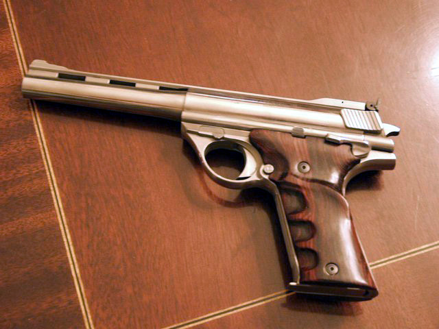 .44AMP Automag Pistol. El Monte period. 6" barrel